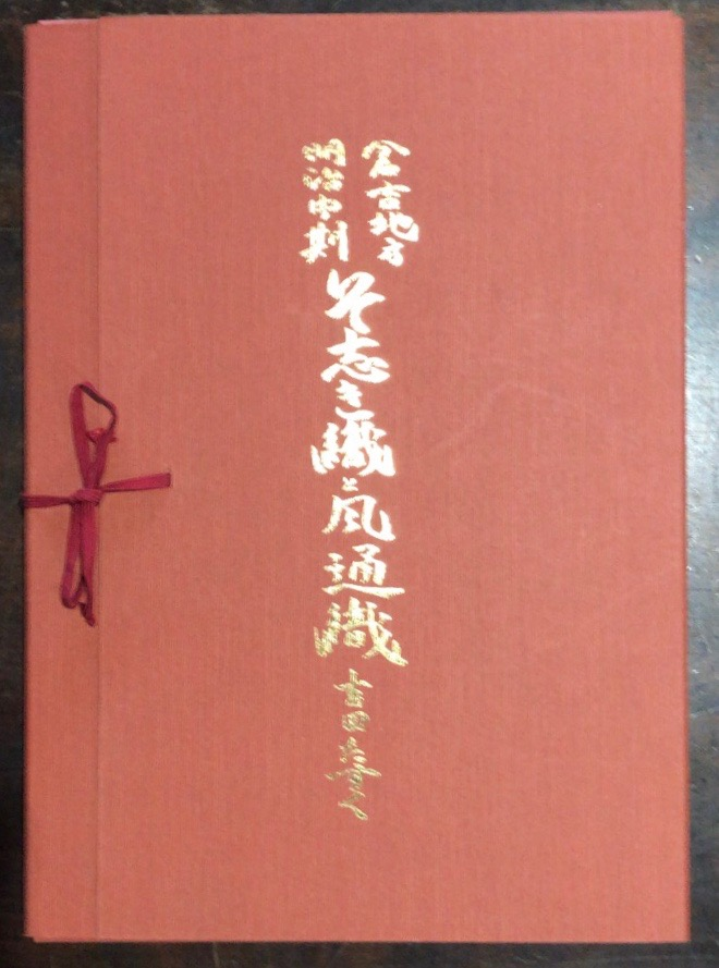 書籍 倉吉地方明治中期 そ志き織と風通織 1988年7月3日発行 吉田たすく死後の一周忌に刊行 具体的な織りと組織図等